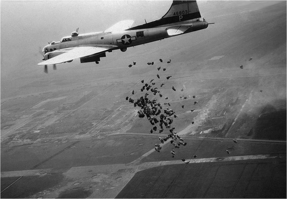 Een Amerikaanse B-17 lost in het kader van operatie Chowhound in mei 1945 boven het totaal verwoeste Schiphol een lading levensmiddelen voor de hongerende Nederlandse bevolking.